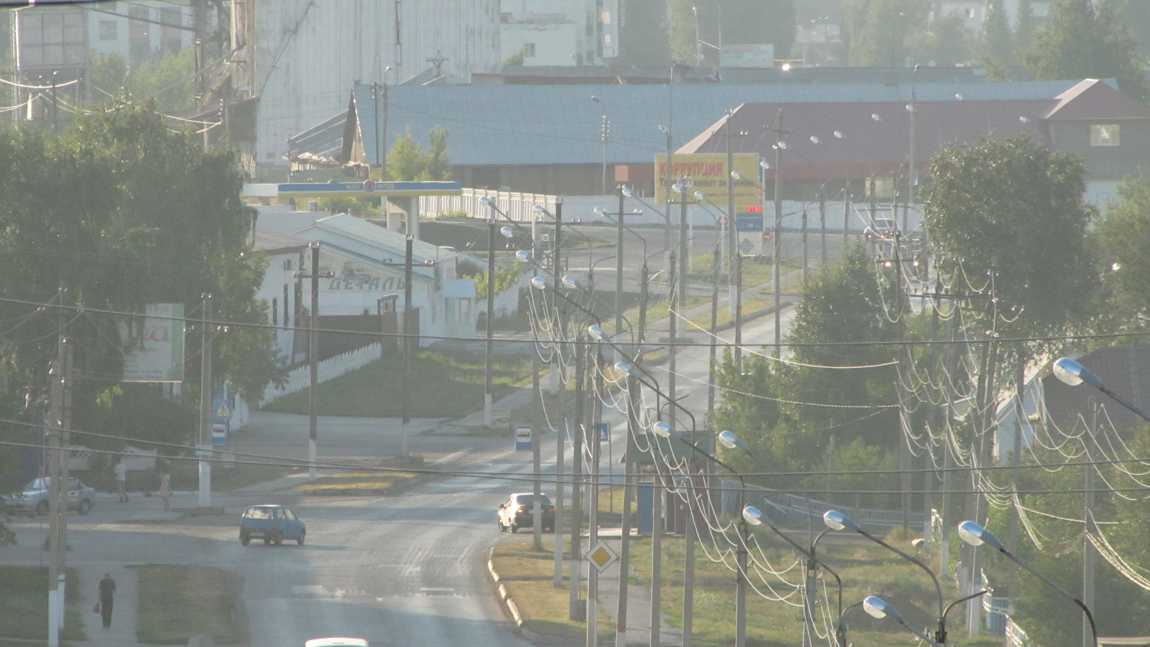 вид на улицу им.Сыртлановой со стороны завода